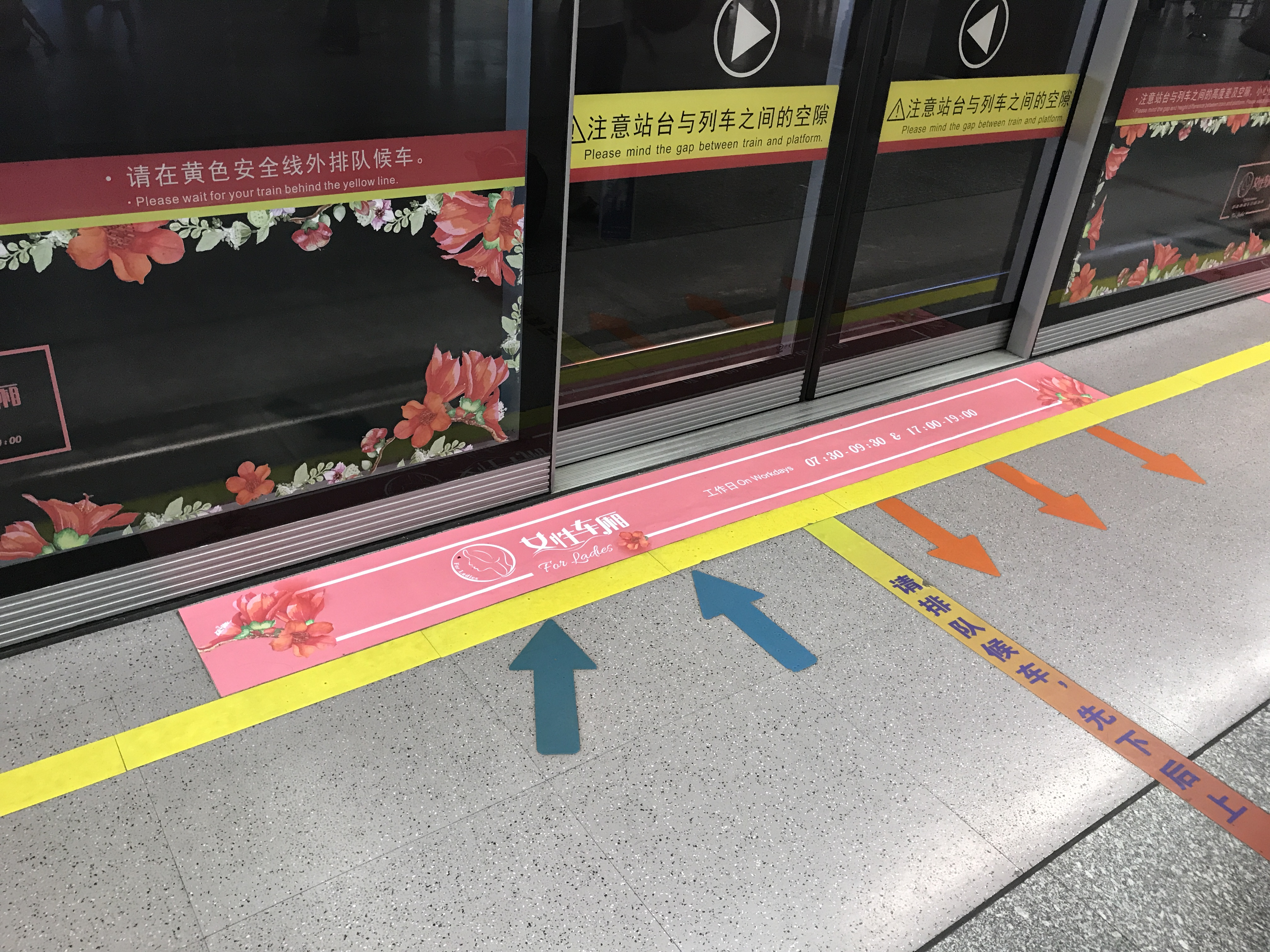 广州地铁1号线女性车厢指示